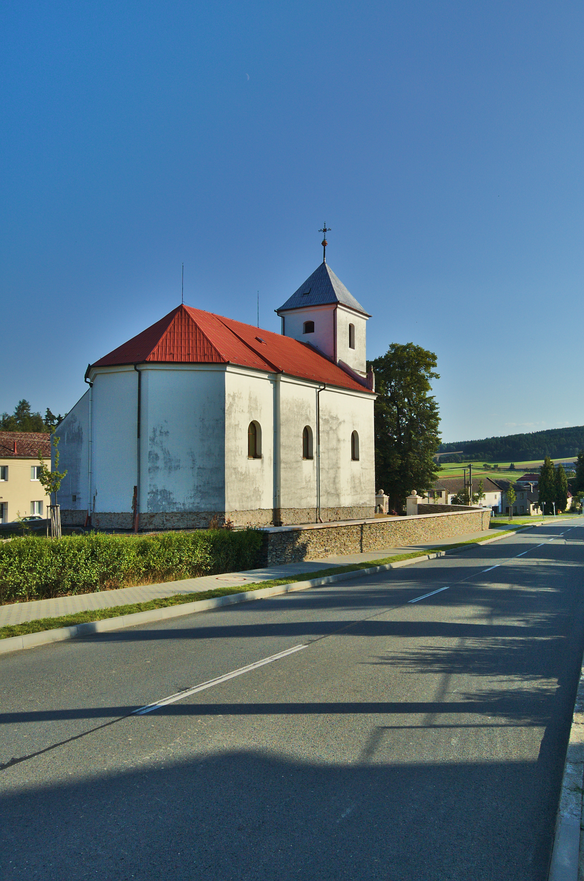 Kostel svatého Jana, Luká, okres Olomouc